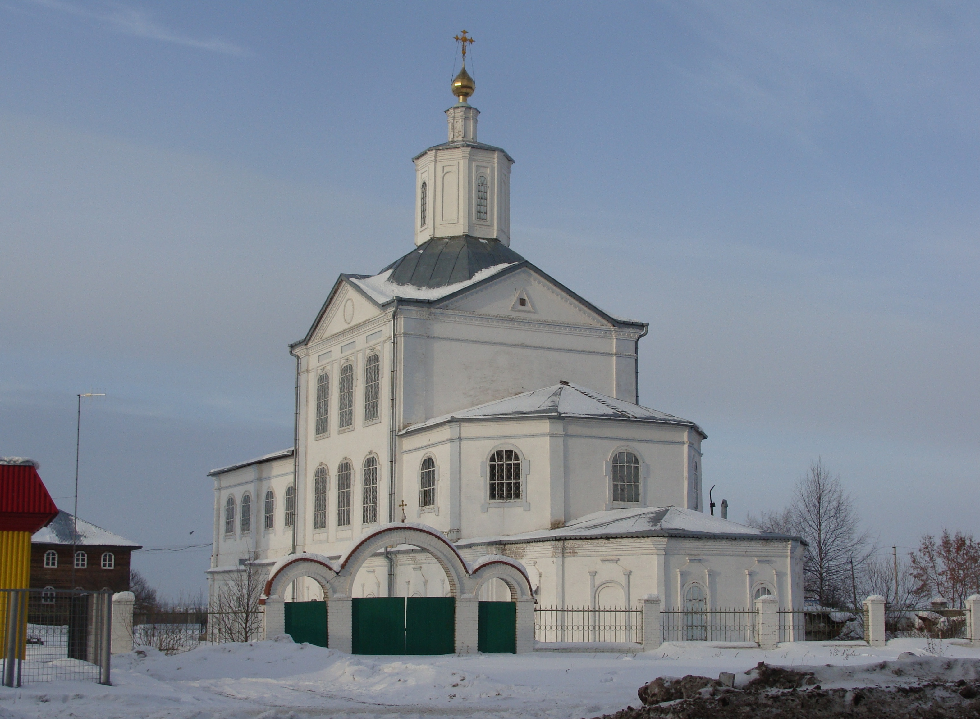 Стефановская церковь